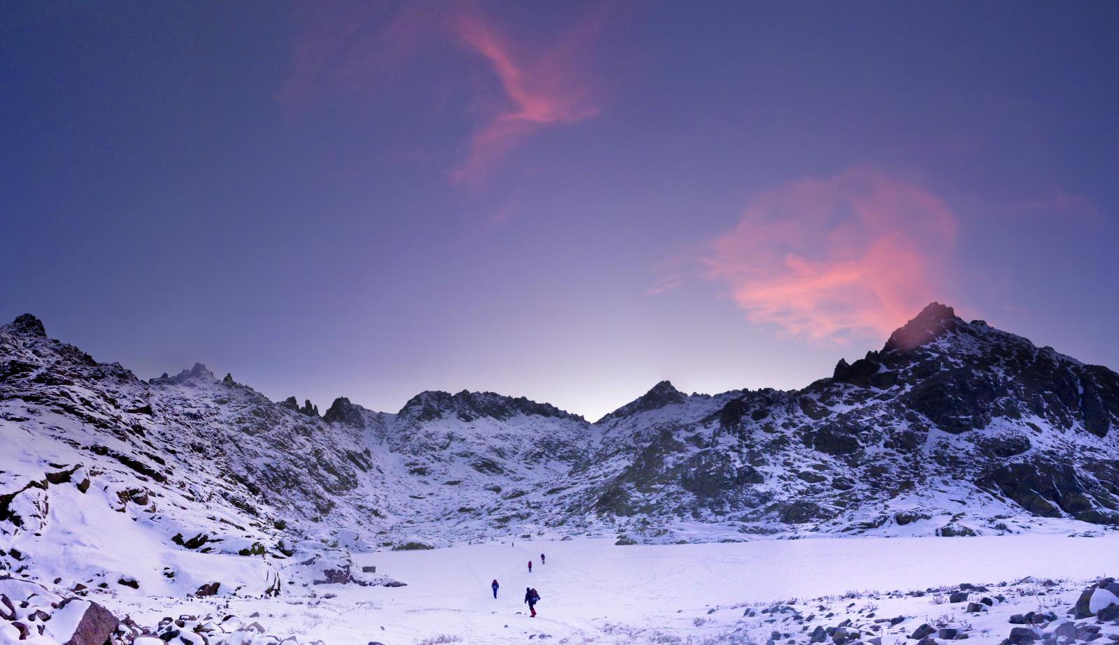 Circo de Gredos This is a photography of a Special Area of Conservation in Spain with the ID: ES4110002. Natura2000 entry, EEA entry